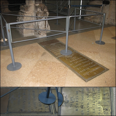 Tumba de Pedro Muñiz en la Catedral de Santiago de Compostela. Abajo, detalle del epitafio en latín.